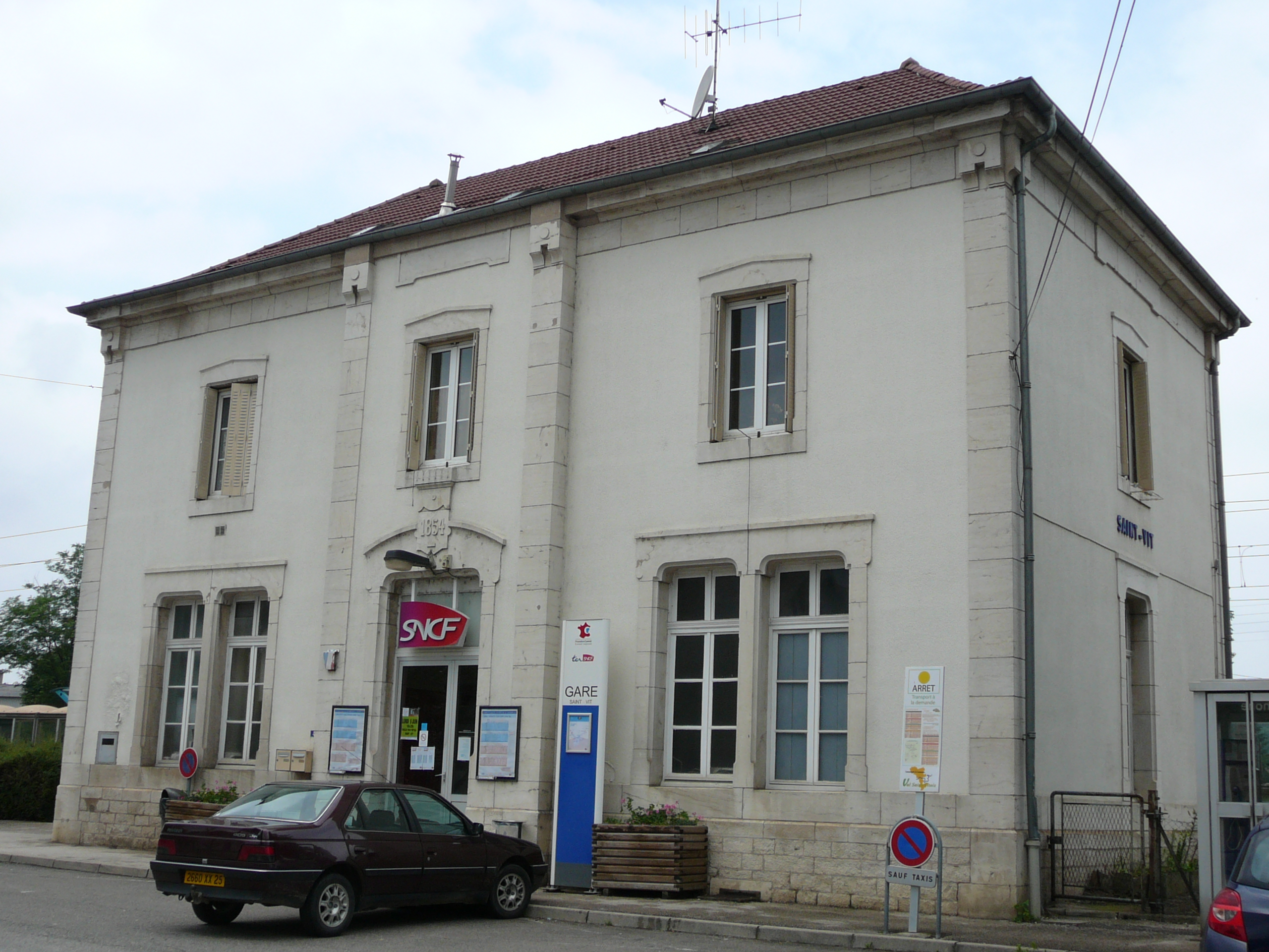 Gare de Saint-Vit, côte cour